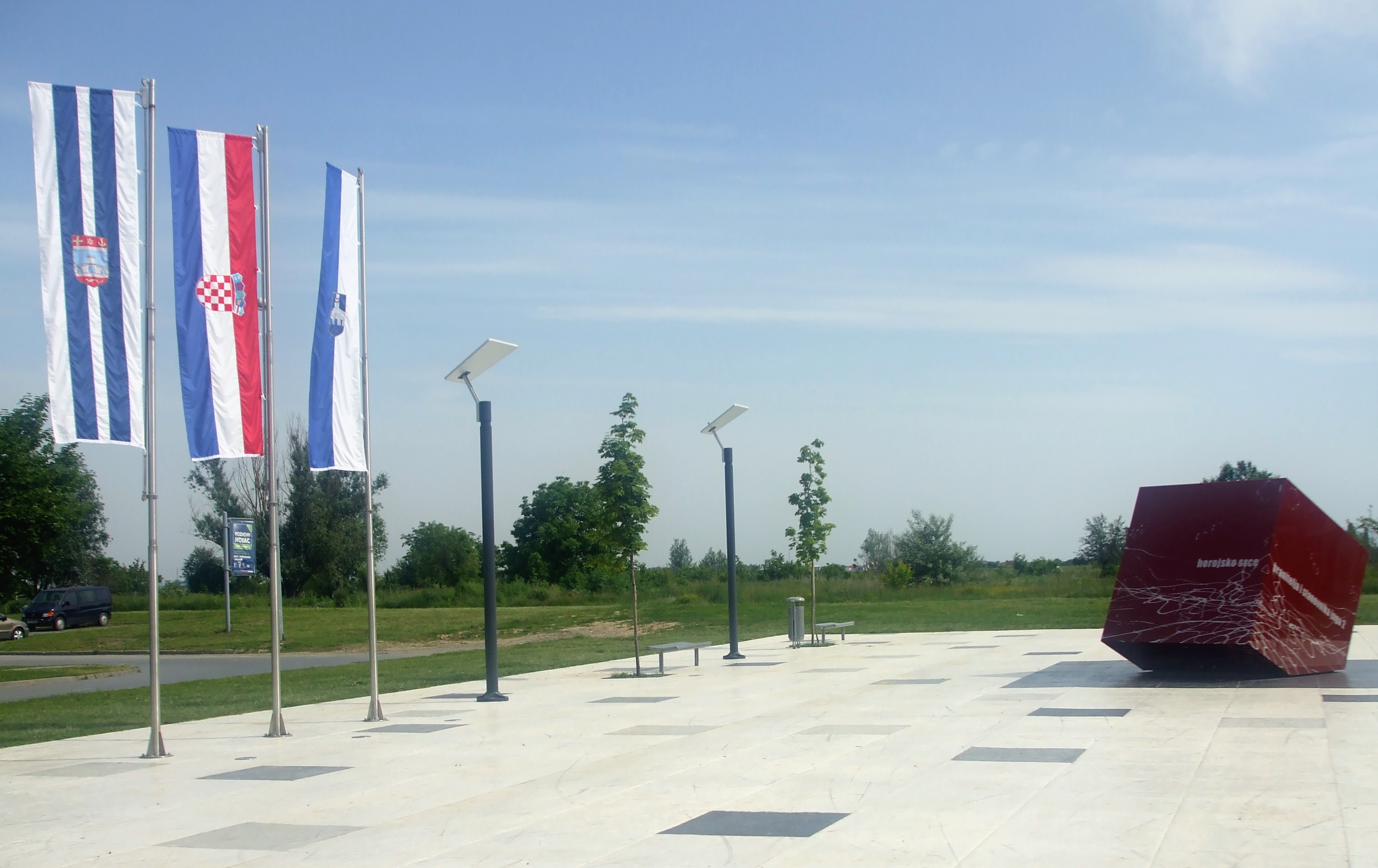 Trg na Jugu 2 u Osijeku. Desno se vidi spomenik živućim i poginulim braniteljima od velikosrpske agresije s natpisom "Herojsko srce branitelja i stanovnika Juga 2".